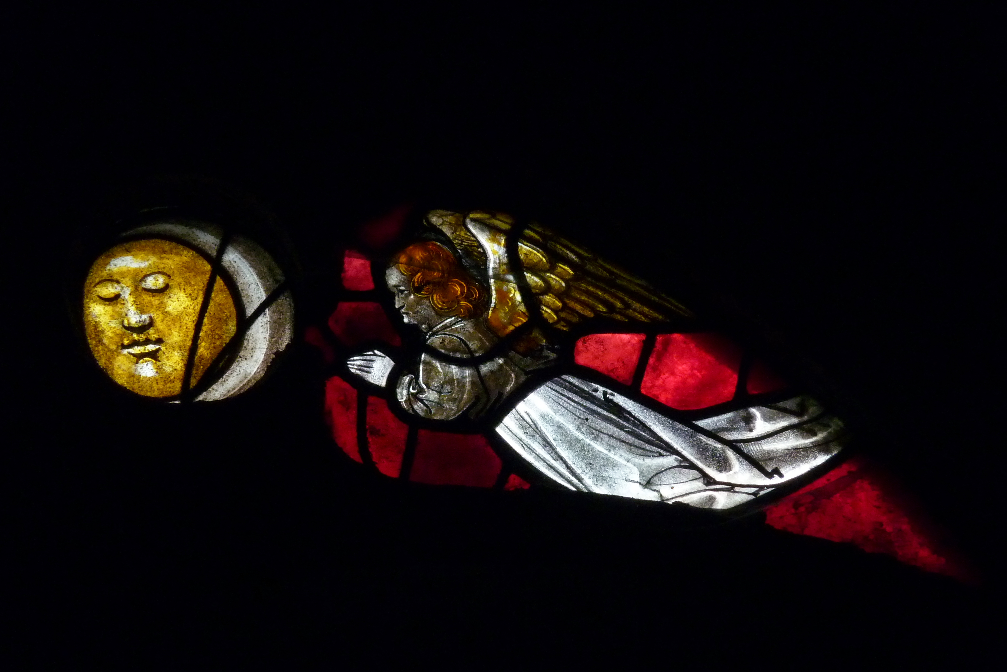 Katholische Kirche Saint-Remi in Ceffonds im Département Haute-Marne (Champagne-Ardenne/Frankreich), Bleiglasfenster (baie 14) aus dem frühen 16. Jahrhundert; Darstellung: Hl. Katharina, hl. Margareta, hl. Barbara; Maßwerk: Engel und Mond (Ausschnitt) .